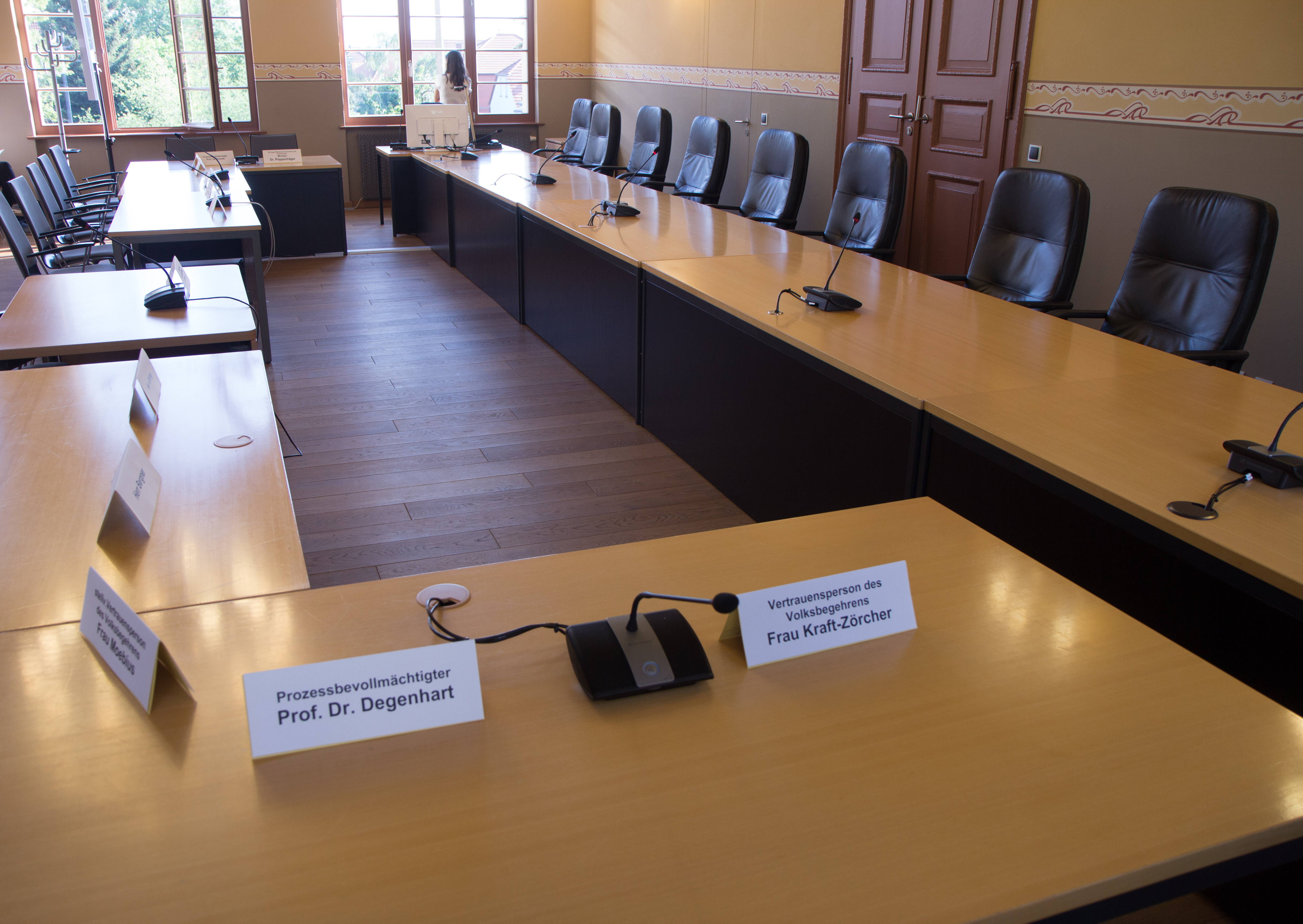 Thüringer Verfassungsgerichtshof. Öffentliche Sitzung am 14. Juni 2017 in Weimar